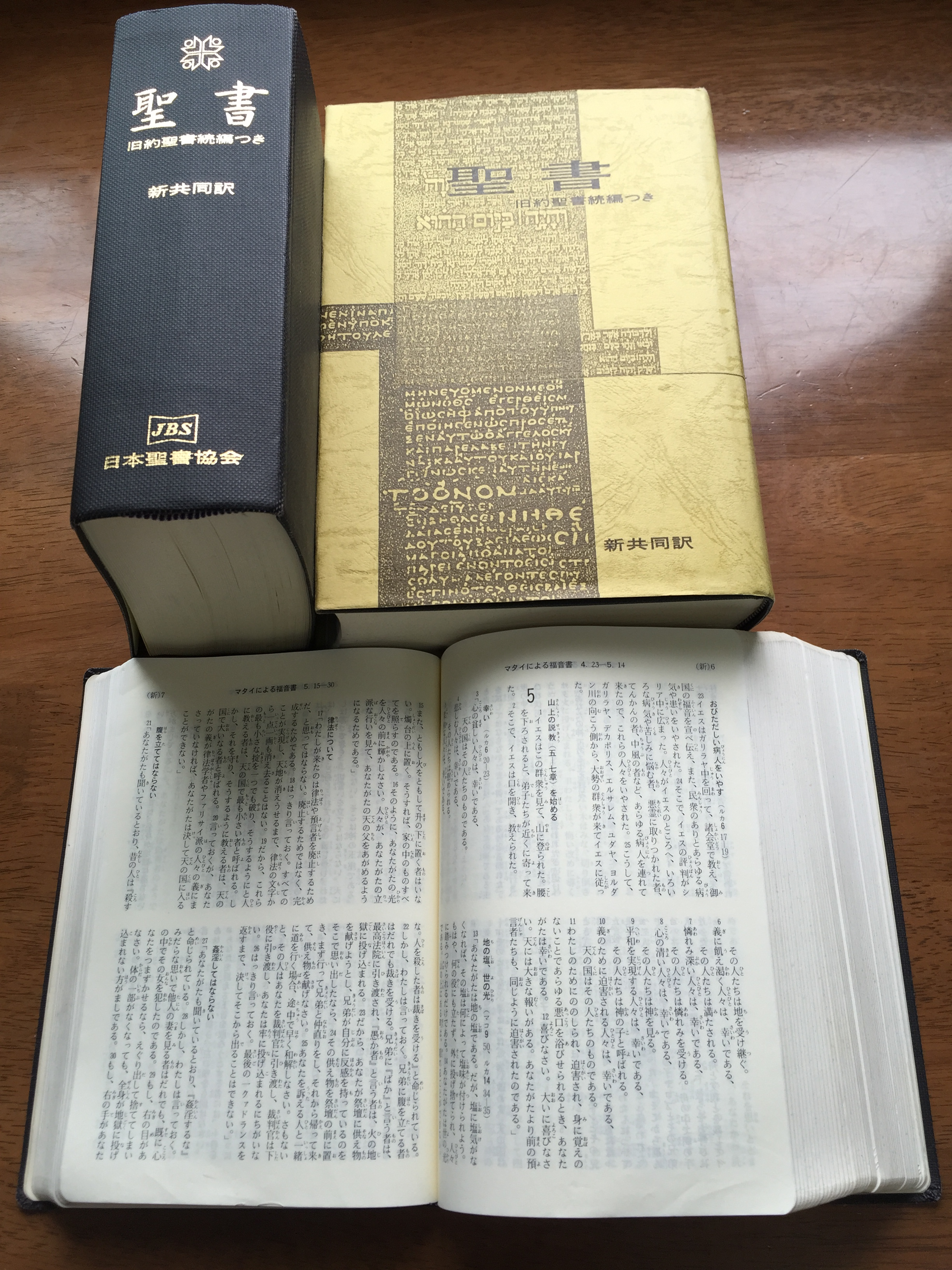 日本聖書協会新共同訳聖書(3冊)